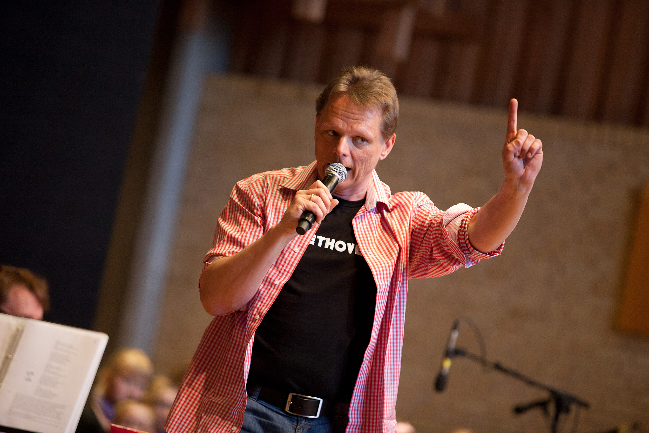 Sigurd Barrett, dansk pianist, entertainer, komponist og forfatter. Her under optræden i Skalborg Kirke.